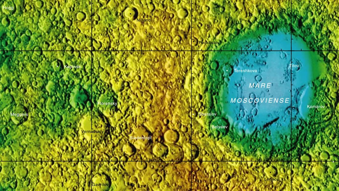 Cráter lunar Florensky. Localización. (Imagen LROC)